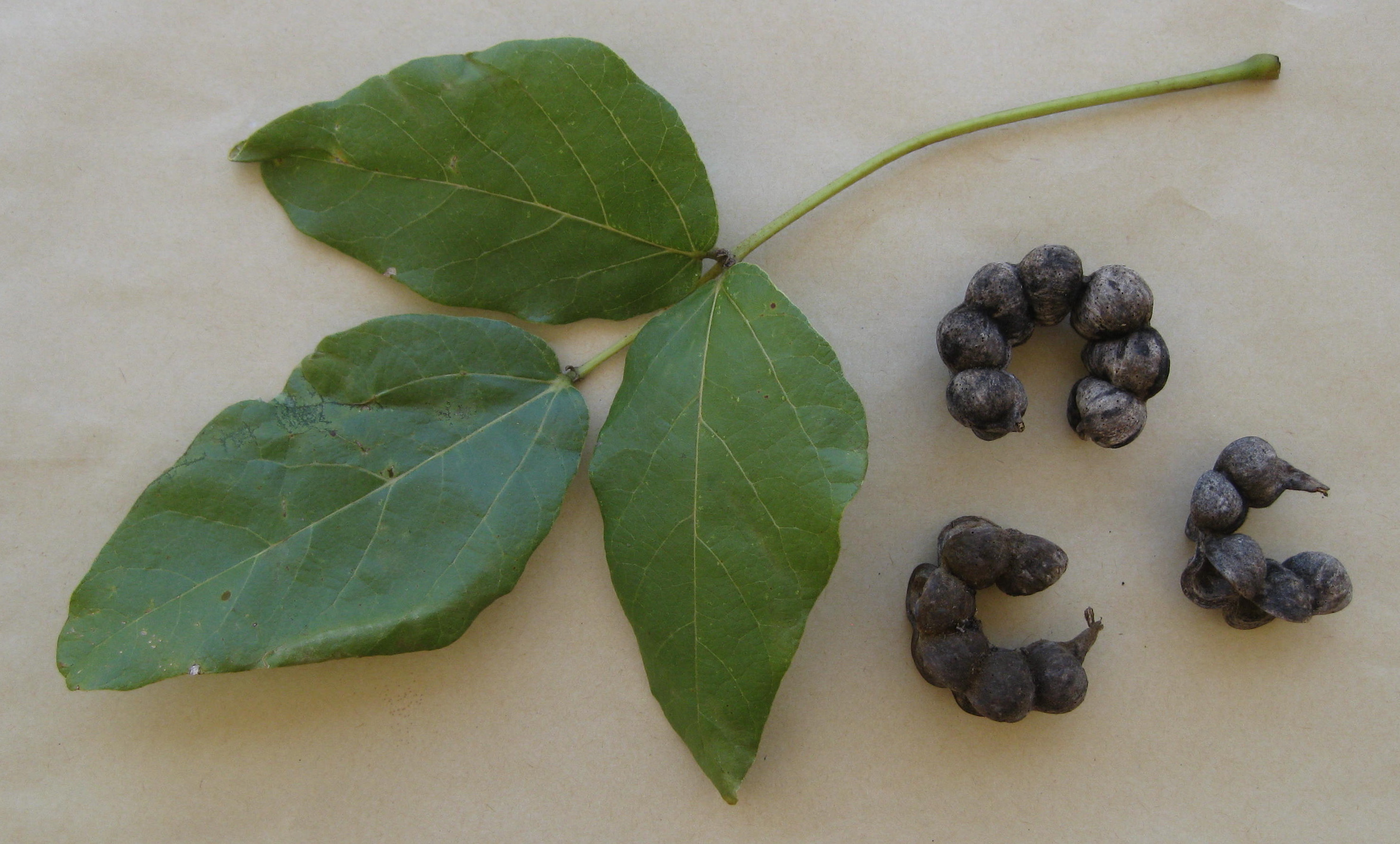 Erythrina haerdii leaf and pods.